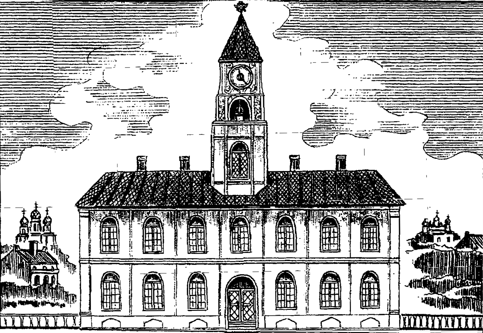 Беларуская (тарашкевіца): Смаленск (Smalensk). Ратуша, пераробленая пад прыказную ізбу